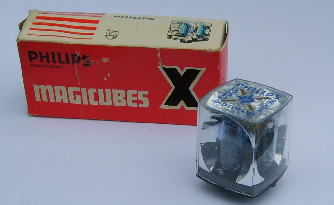 meervoudig flitslicht